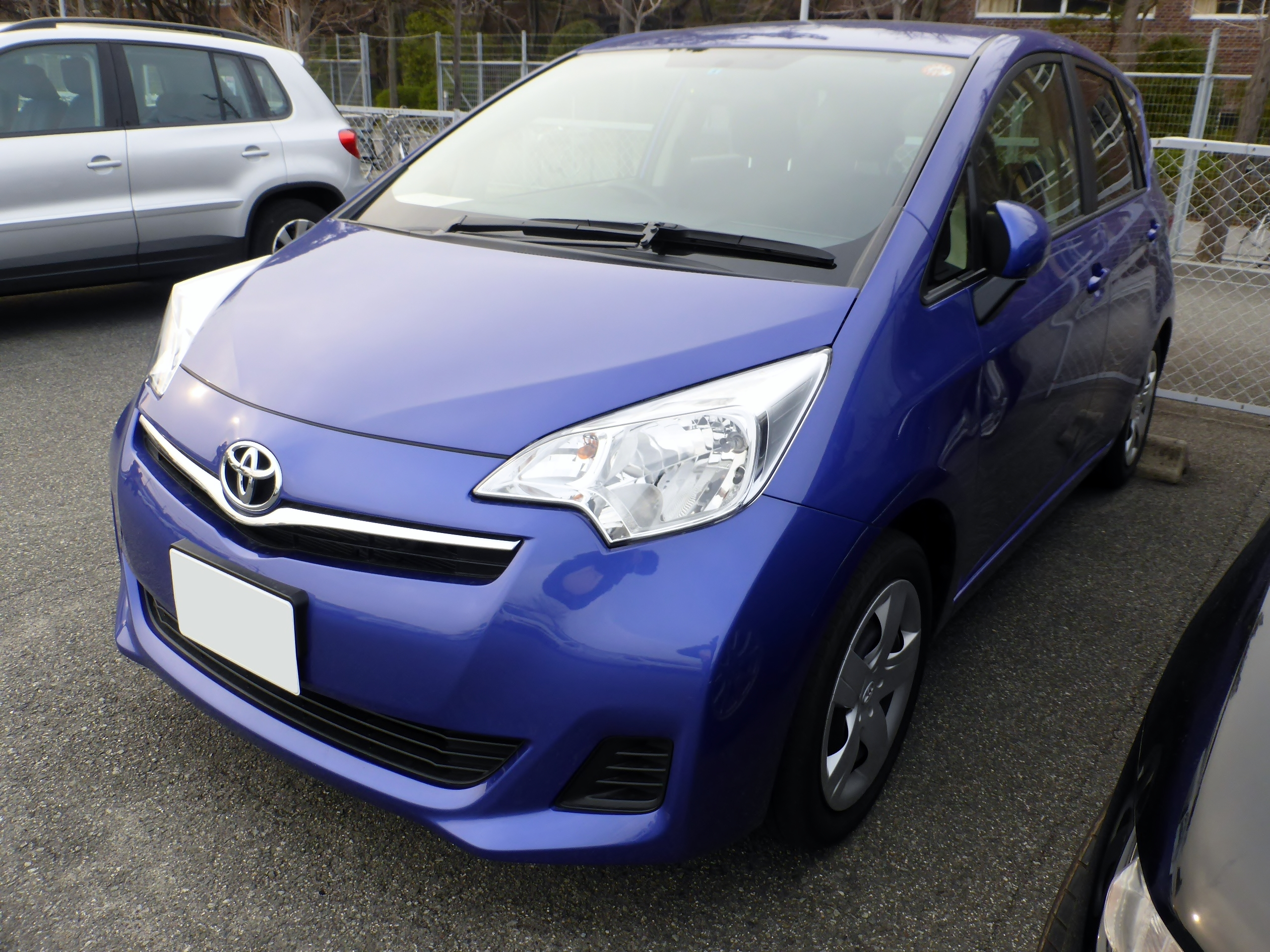 CP120型トヨタ・ラクティス1.5Gをフロントから撮影。